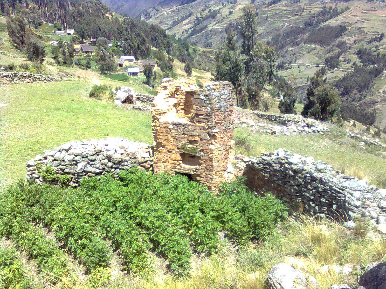 Estructuras arquitectónicas del sitio arqueológico de Tacaj.